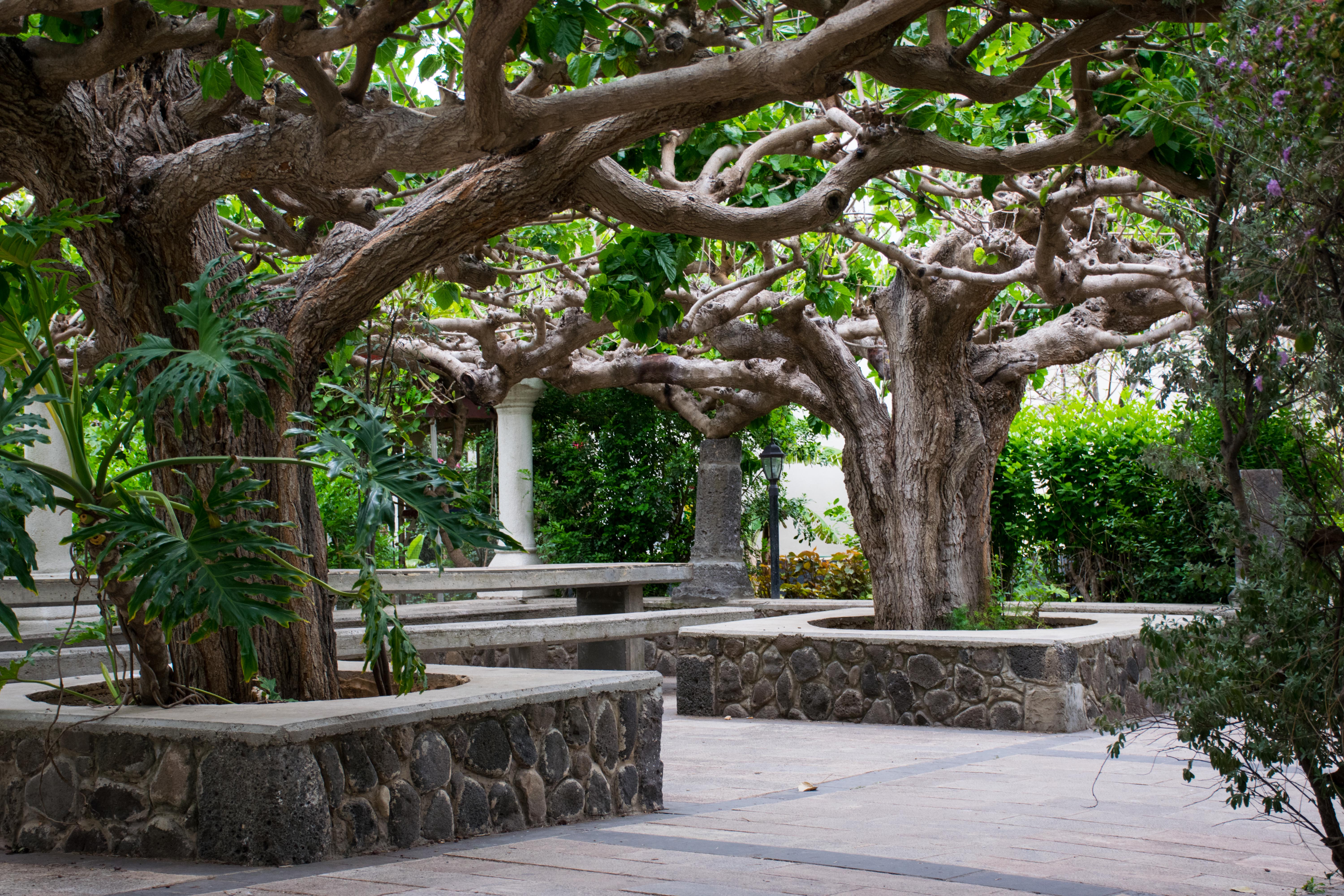 DSC_1669.jpg Tiberias